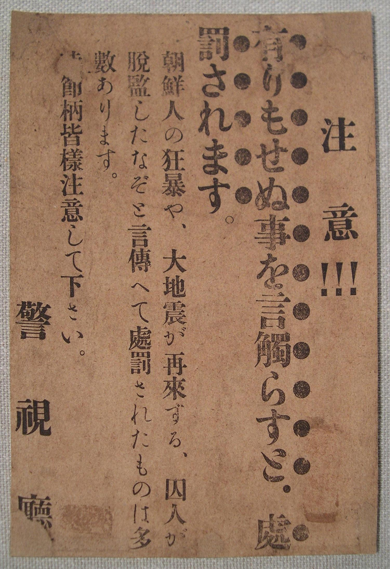 関東大震災の注意ビラ 注意！！！ 有りもせぬ事を言觸らすと.處罰されます。 朝鮮人の狂暴や、大地震が再來する、囚人が脱監したなぞと言傳へて處罰されたものは多數あります。時節柄皆様注意して下さい。警 視 廳 （注意！！！有りもせぬ事を言触らすと 処罰されます。朝鮮人の狂暴や、大地震が再来する、囚人が脱監したなぞと言伝へて処罰されたものは多数あります。時節柄皆様注意して下さい。警視庁）